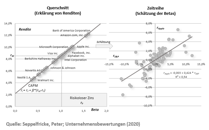 Schätzungen des CAPM